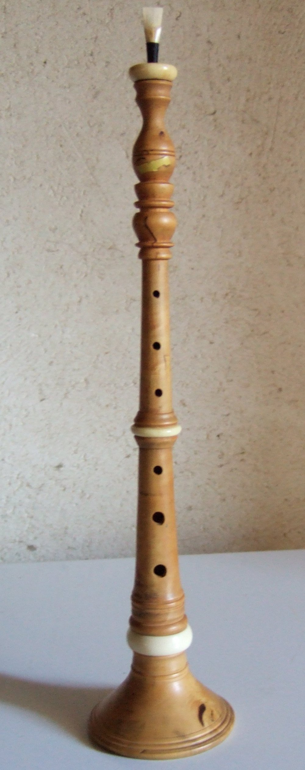 Bombarde en sol à 6 trous sans clefs en buis avec une anche, gamme tempérée. Originaire du pays de Vannes.